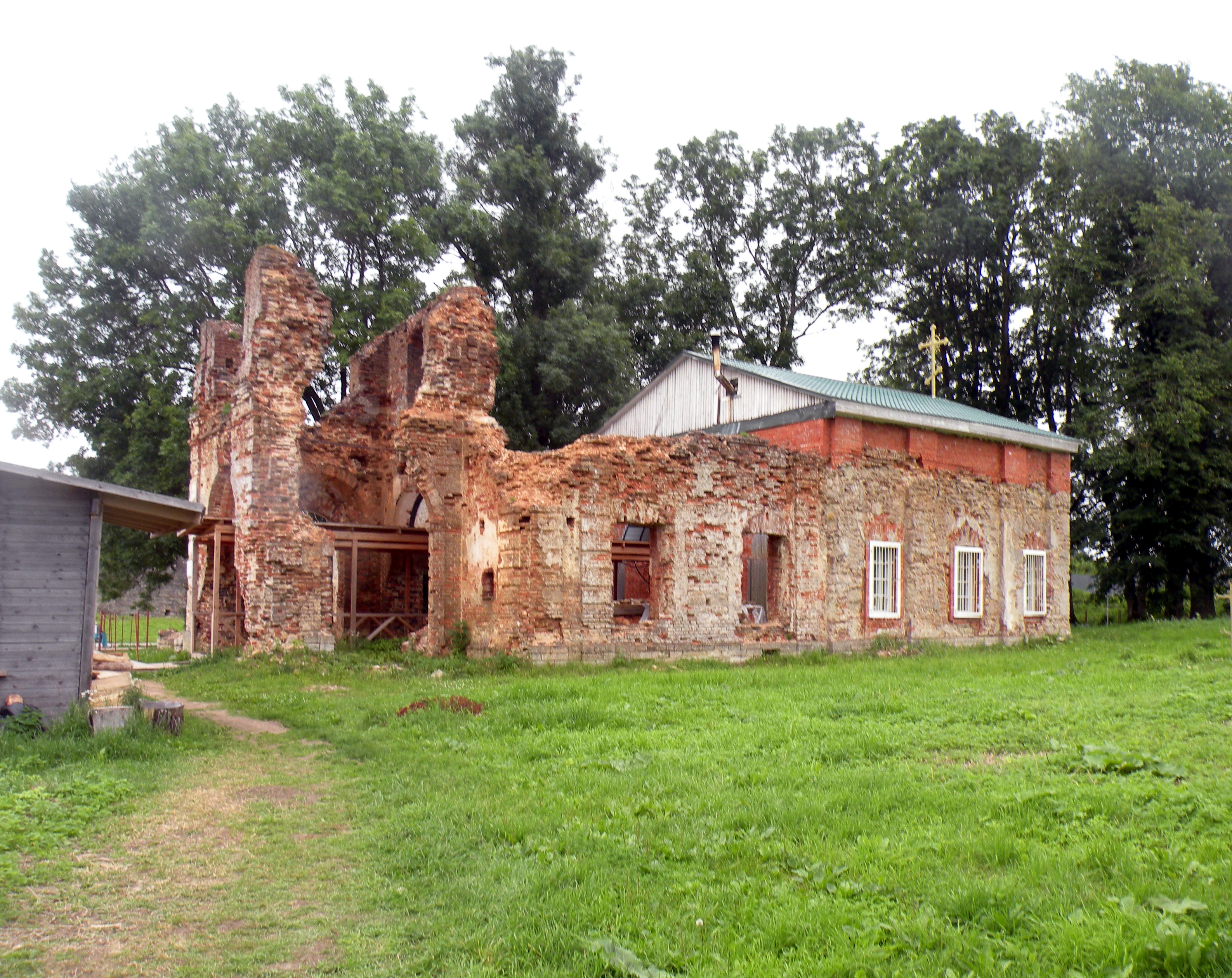 Преображенская церковь в крепости Копорье